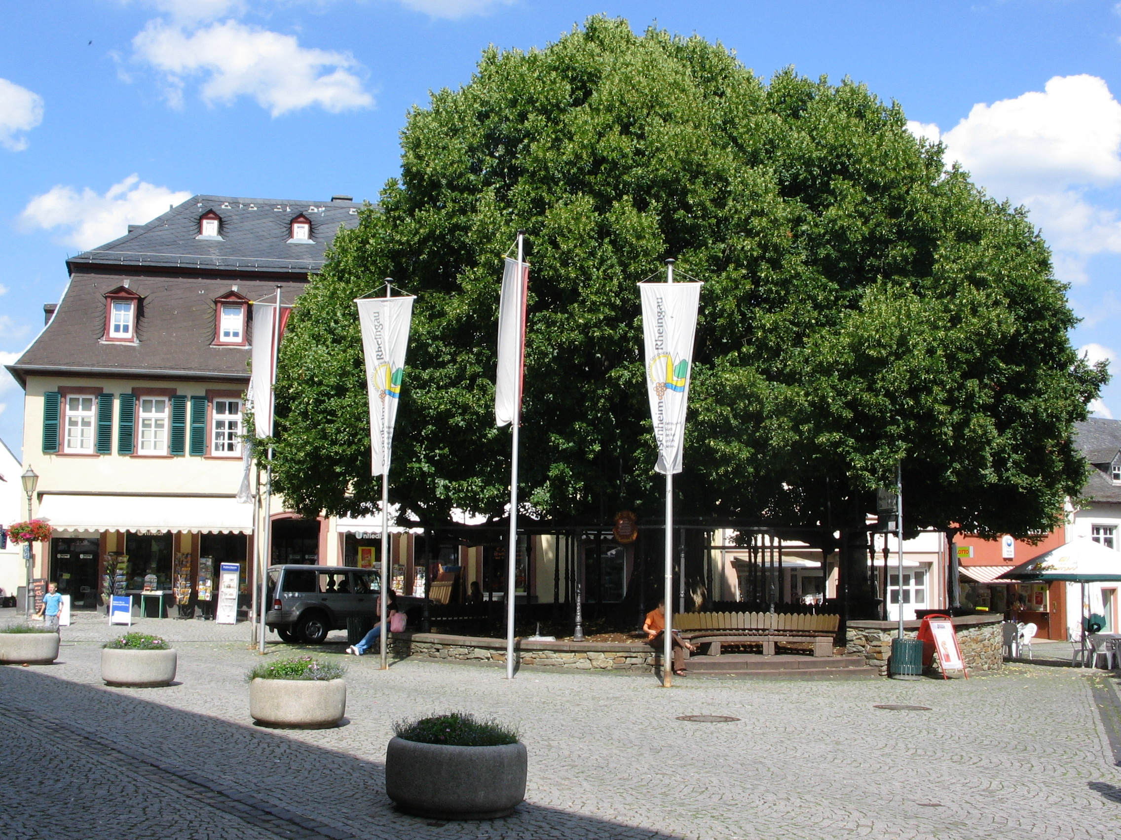 Die Linde auf dem Lindenplatz vor dem Rathaus in Geisenheim am Rhein ist etwa 700 Jahre alt und wurde im Jahre 1568 erstmals urkundlich erwähnt.